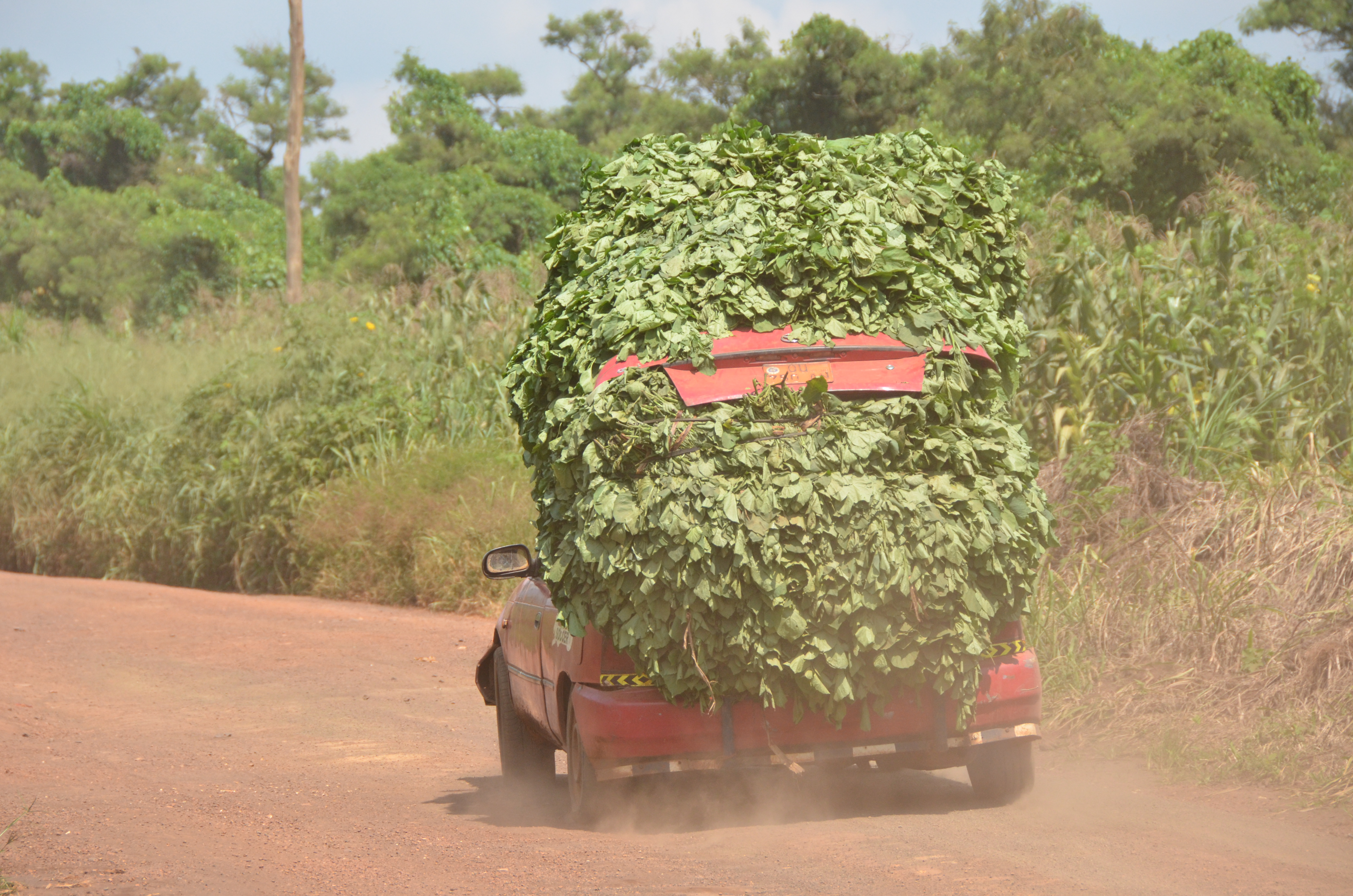 Véhicule transportant des légumes dans la ville de Foumbot à l'Ouest du Cameroun This is an image with the theme "Africa on the Move or Transport" from: Cameroon